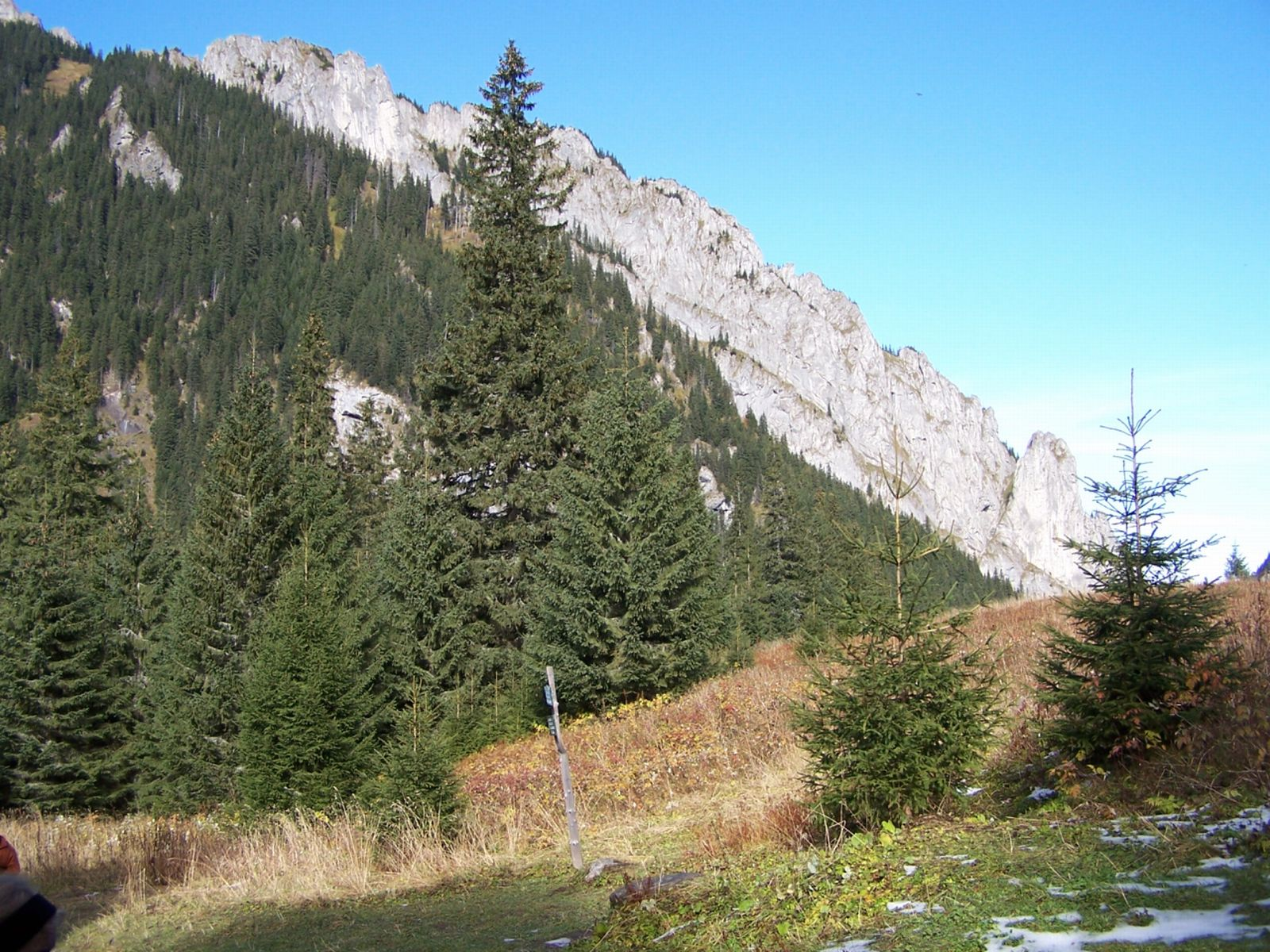 Raptawickie Turnie nad wejściem do Doliny Smytniej